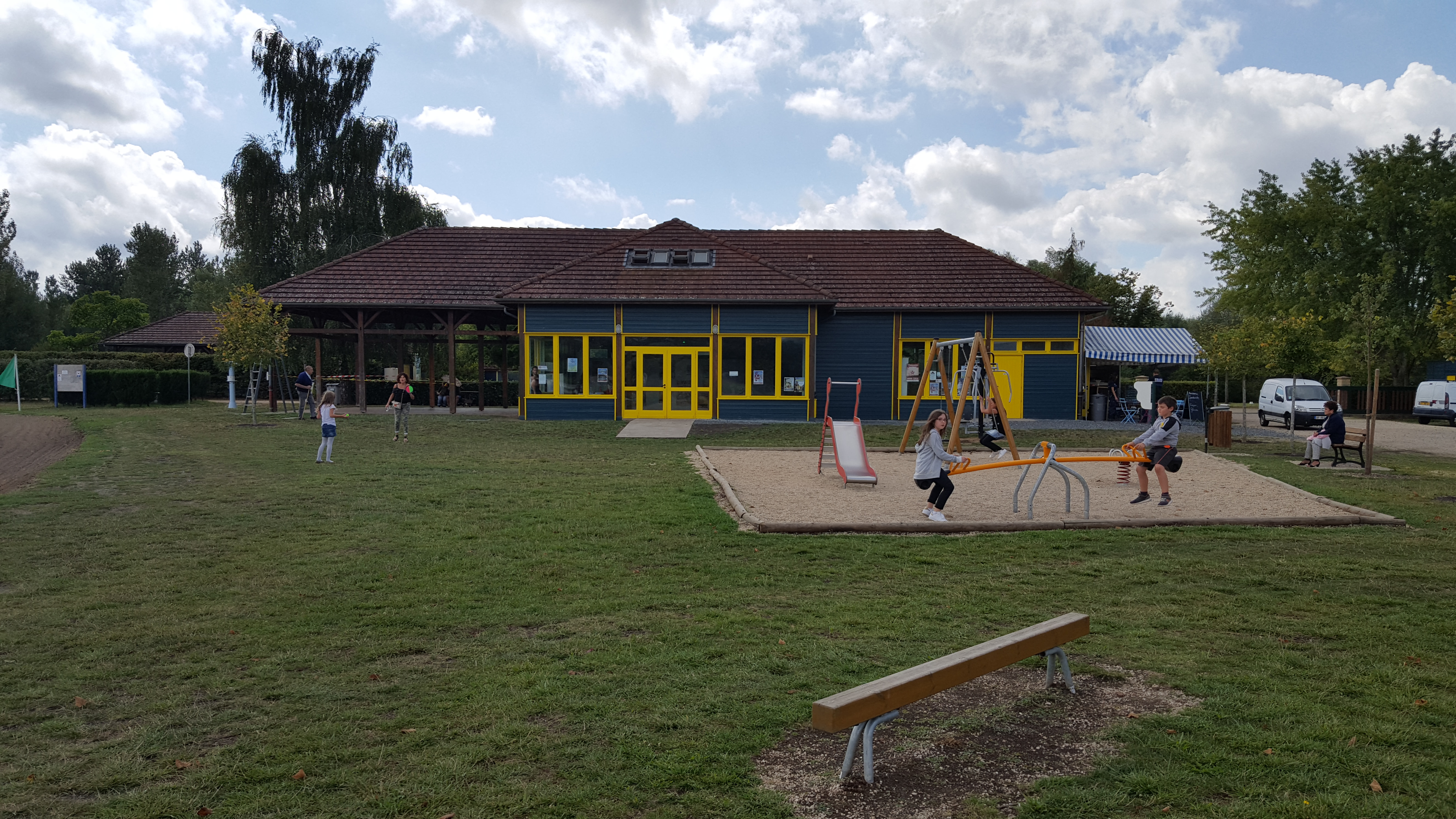 ILOA, Les Rives de Thiers